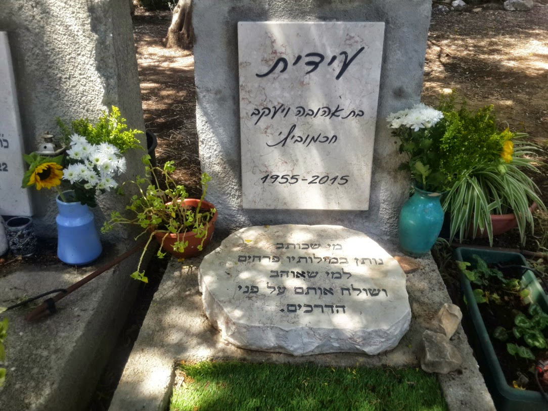 קברה של עידית חכמוביץ ביגור צילום אלי אלון